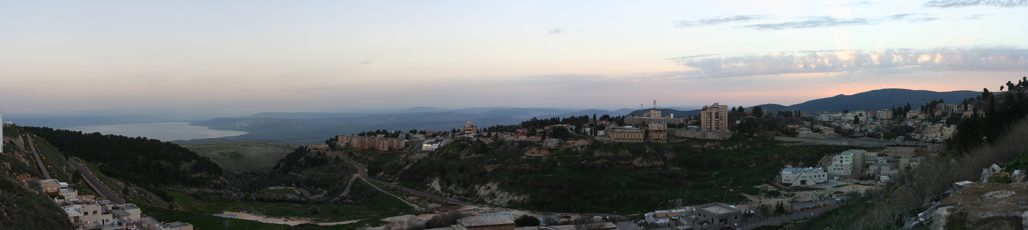 Zefat